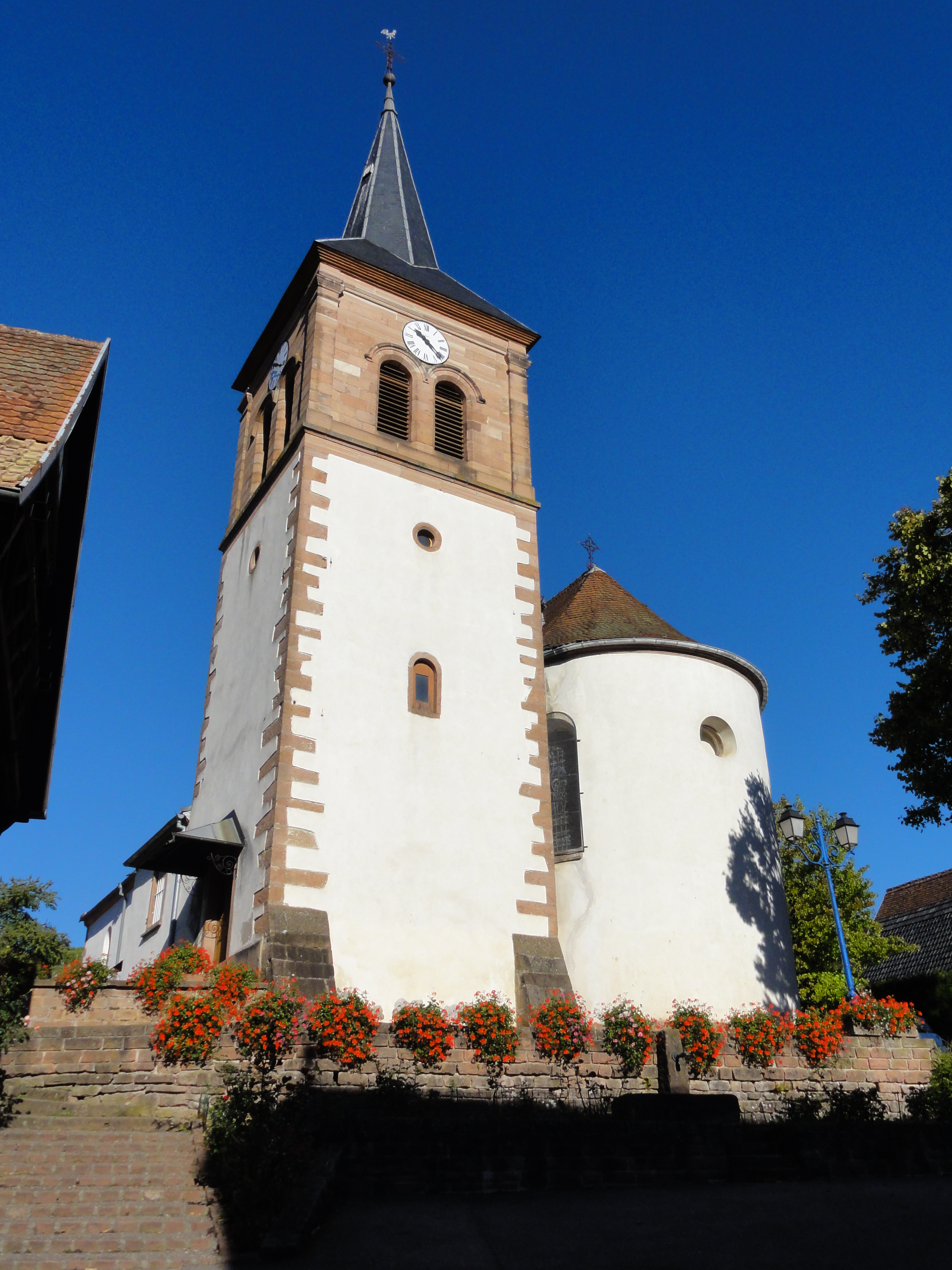 Alsace, Bas-Rhin, Albé, Église Saint-Wendelin (IA67010399). Clocher du XIVe rehaussé au XIXe.